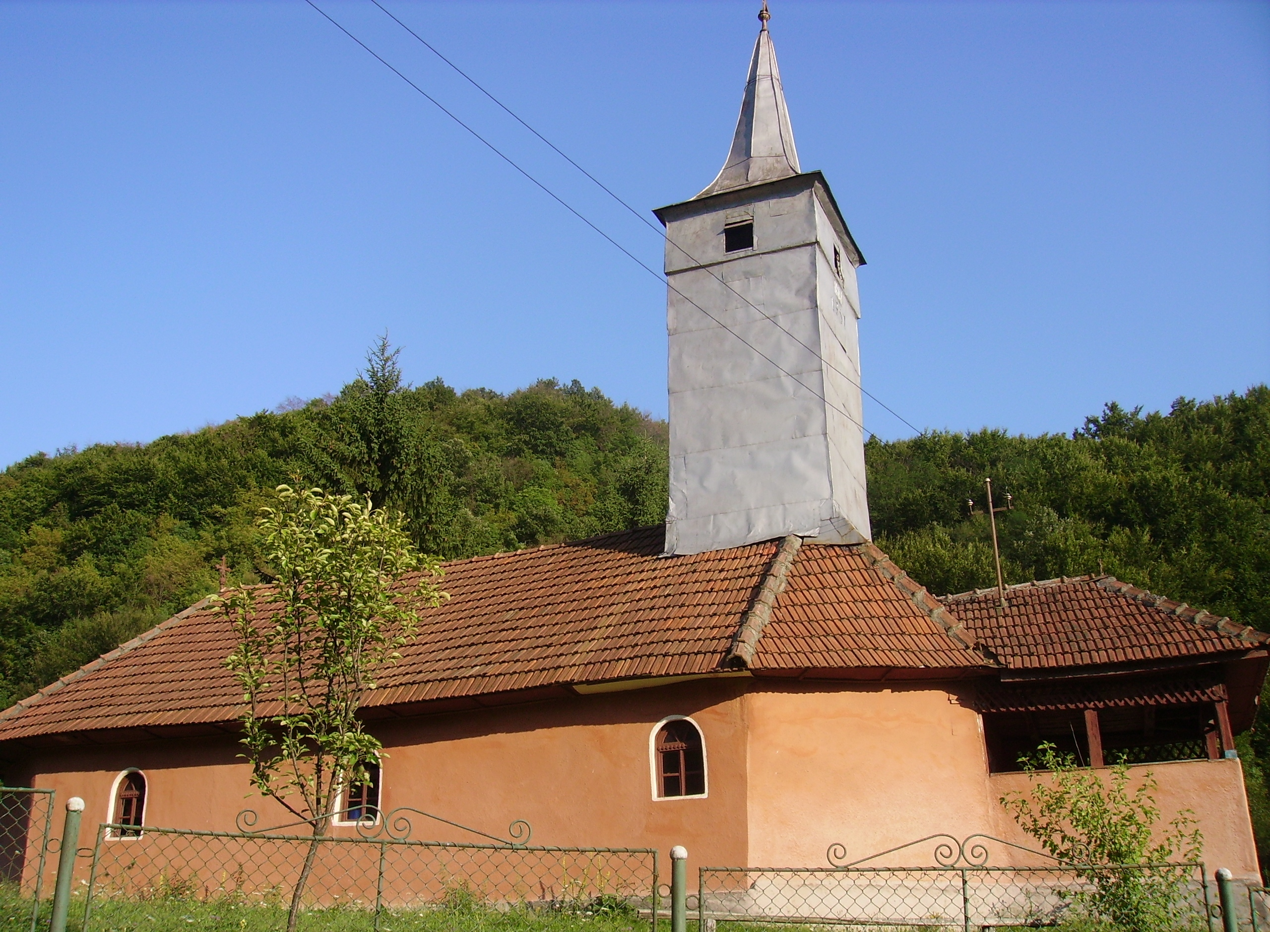 Biserica de lemn din Godinești, județul Hunedoara